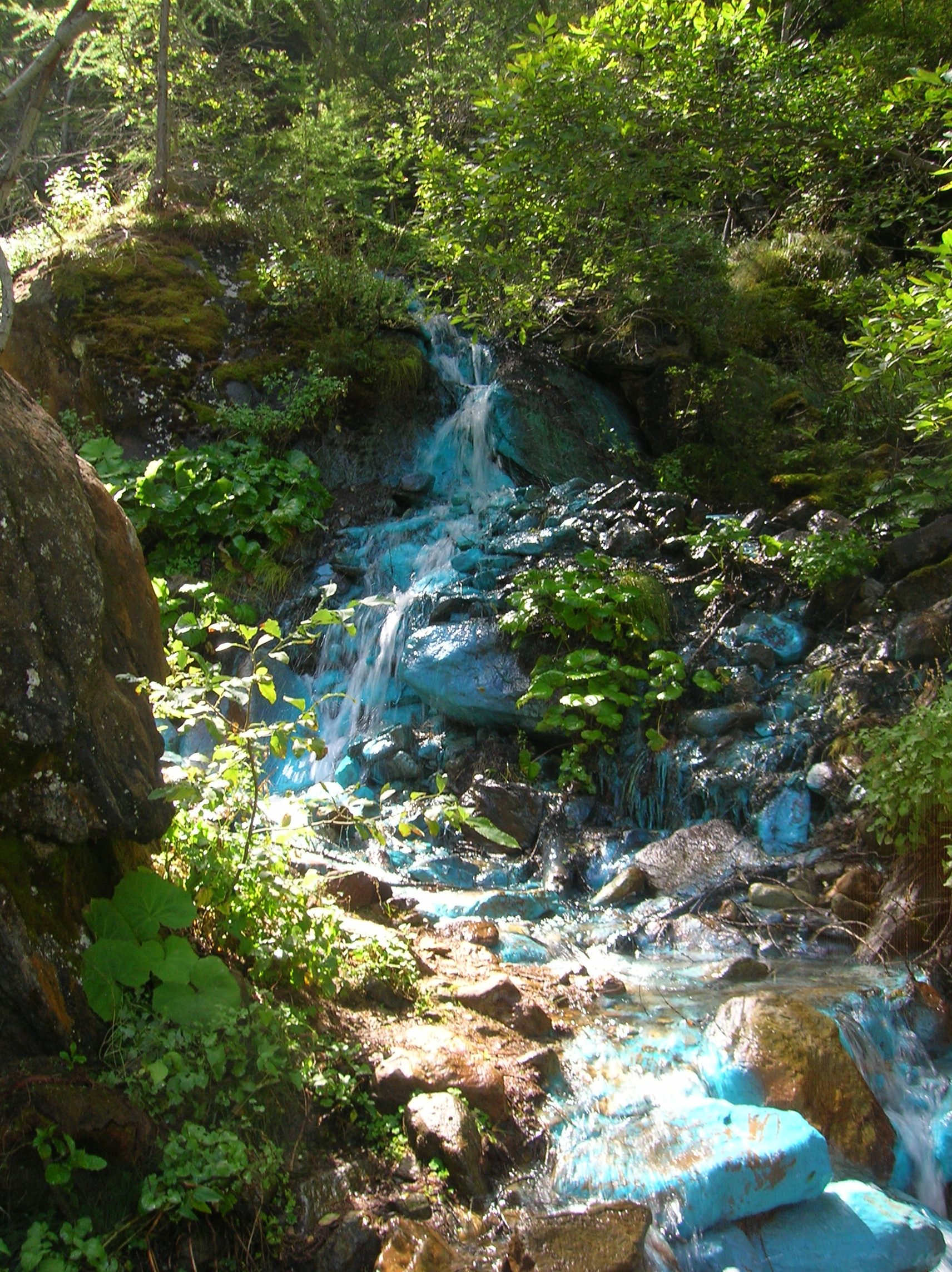 Eve-verda, sorgente di acqua turchese nel vallone di Saint-Marcel, Saint-Marcel, Valle d'Aosta, Italia.